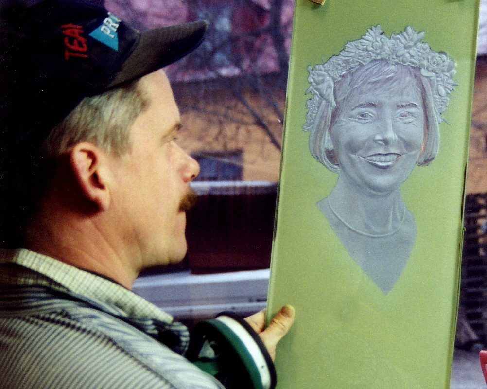 Peter Sitell, djupblästring av ett porträtt